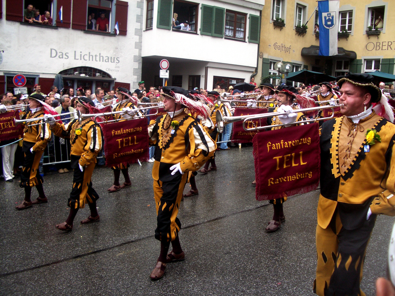 Ravensburg, Germany: Rutenfest, Festzug am Rutenmontag, Fanfarenzug Tell